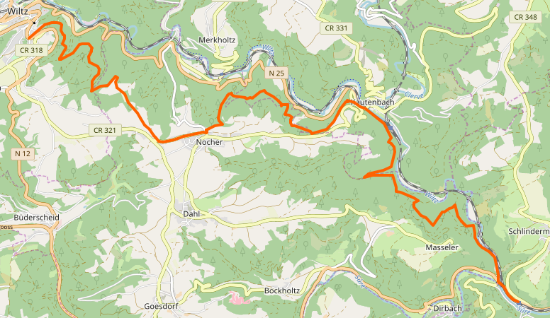 Streck vum Wolz-Pad